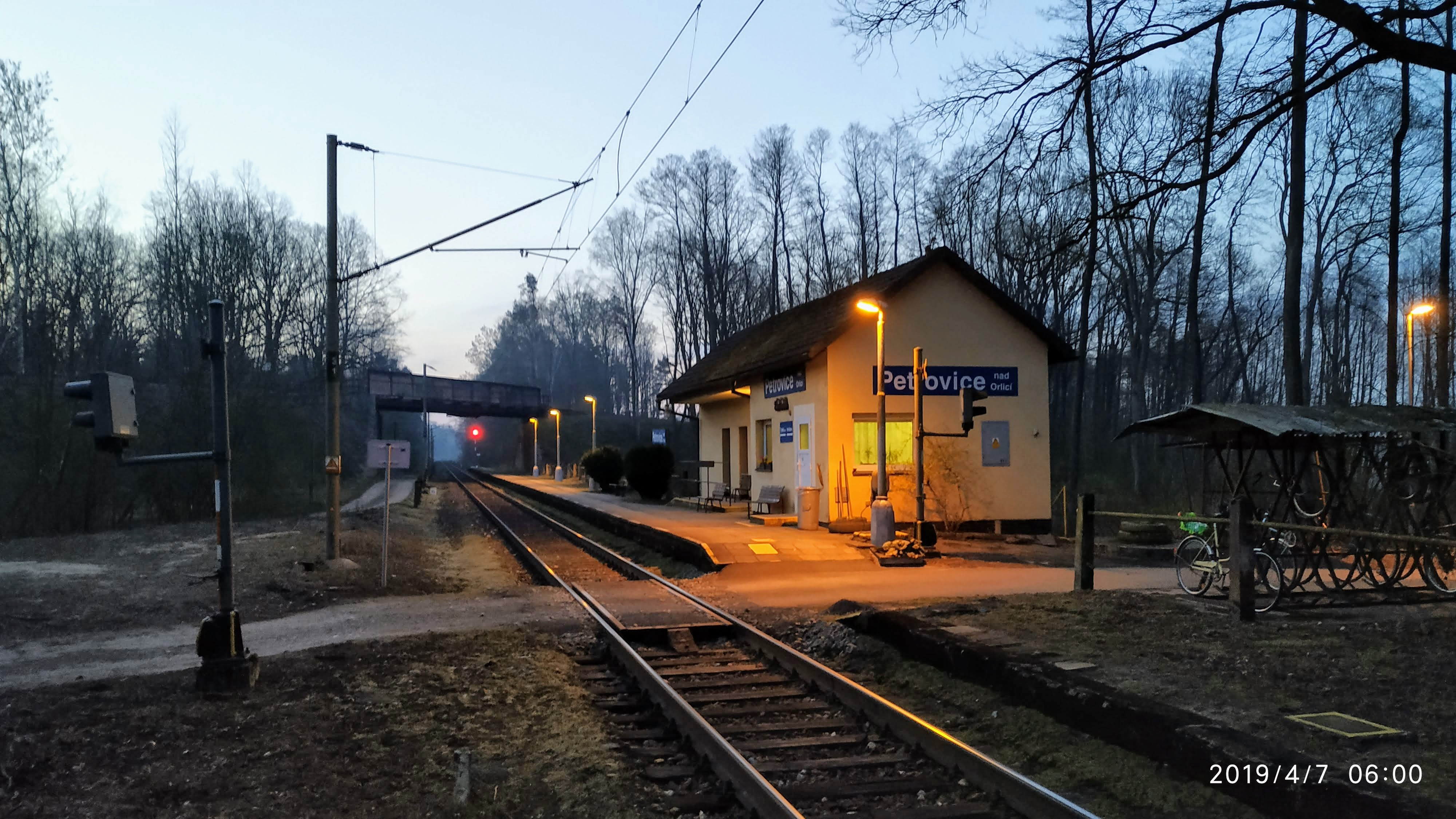 Hláska Petrovice od Třebechovic